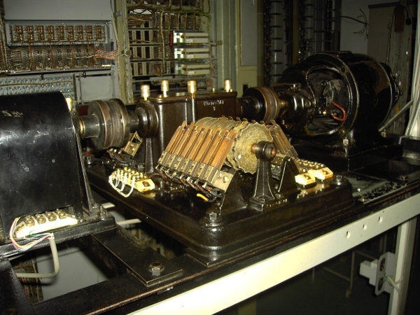 RSM Model 23 - Deutsche Reichspost Bildquelle: Fundus Interessengemeinschaft Historische Fernmeldetechnik e.V Foto: Jh-Furth